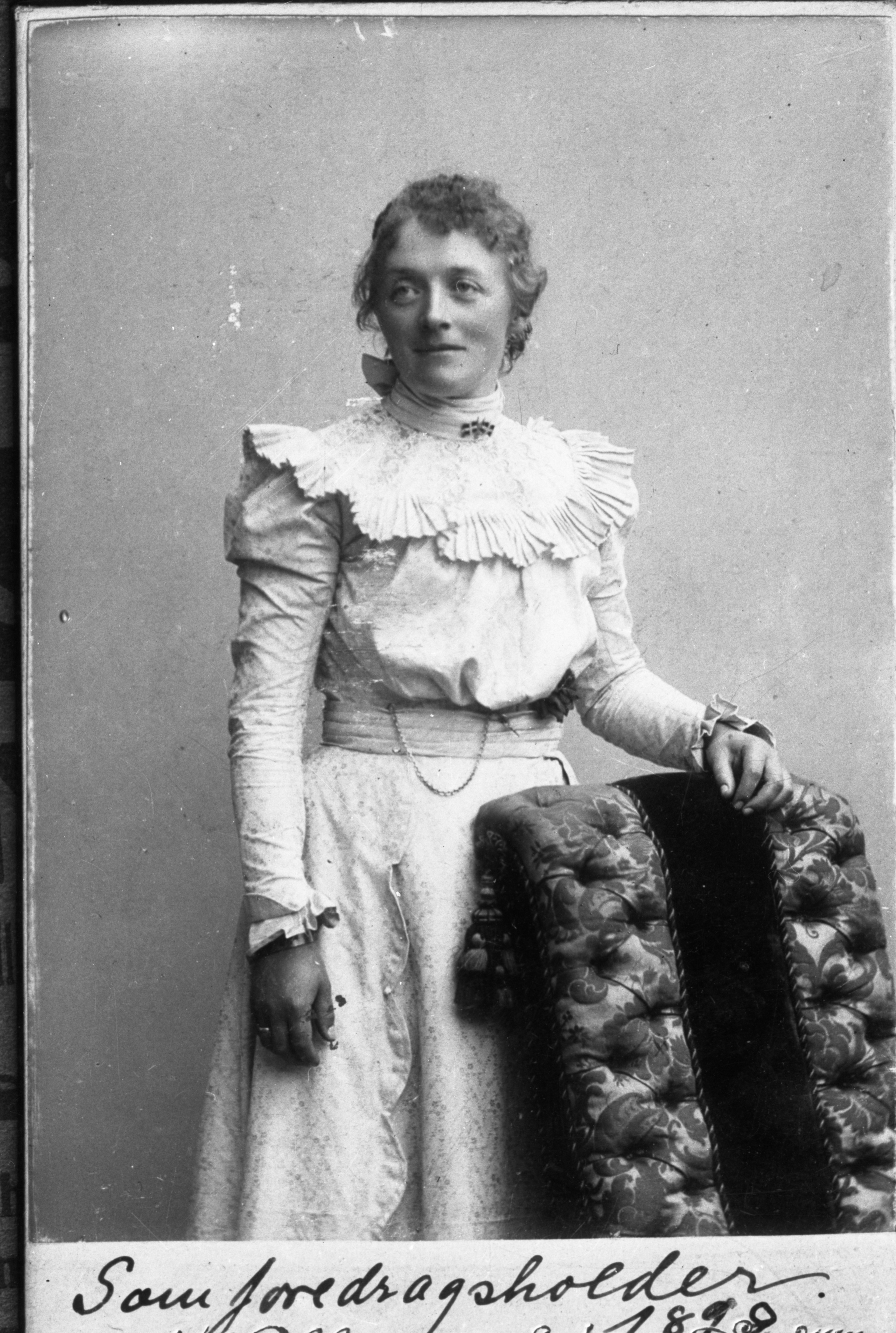 Studioportrett av Betzy Kjelsberg i 1899.